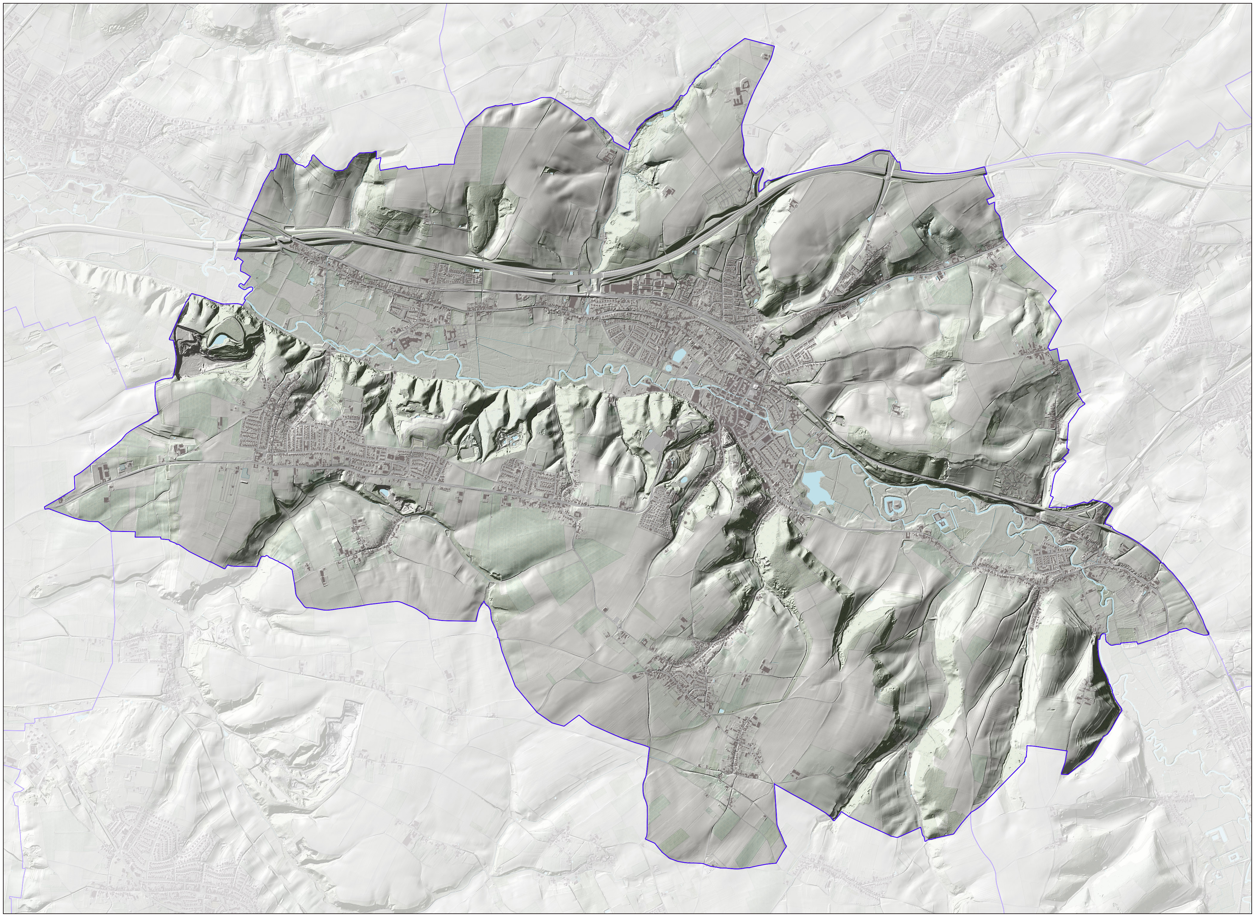 Reliëfbeeld van de gemeente, o.b.v. het Actuele Hoogtebestand Nederland (AHN2, open data) met subtiele elementen uit de Basisregistratie Topografie (BRT/Top10NL, open data). Kaartbeeld samengesteld door Jan-Willem van Aalst.